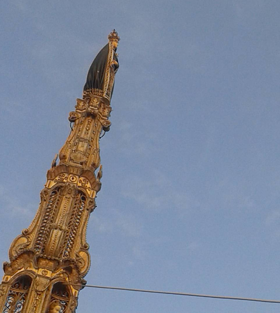 Particolare della statua della Vergine addolorata posta sul carro di Mirabella Eclano. Si intravede anche una delle corde che vengono tirate per garantire la stabilità della struttura.